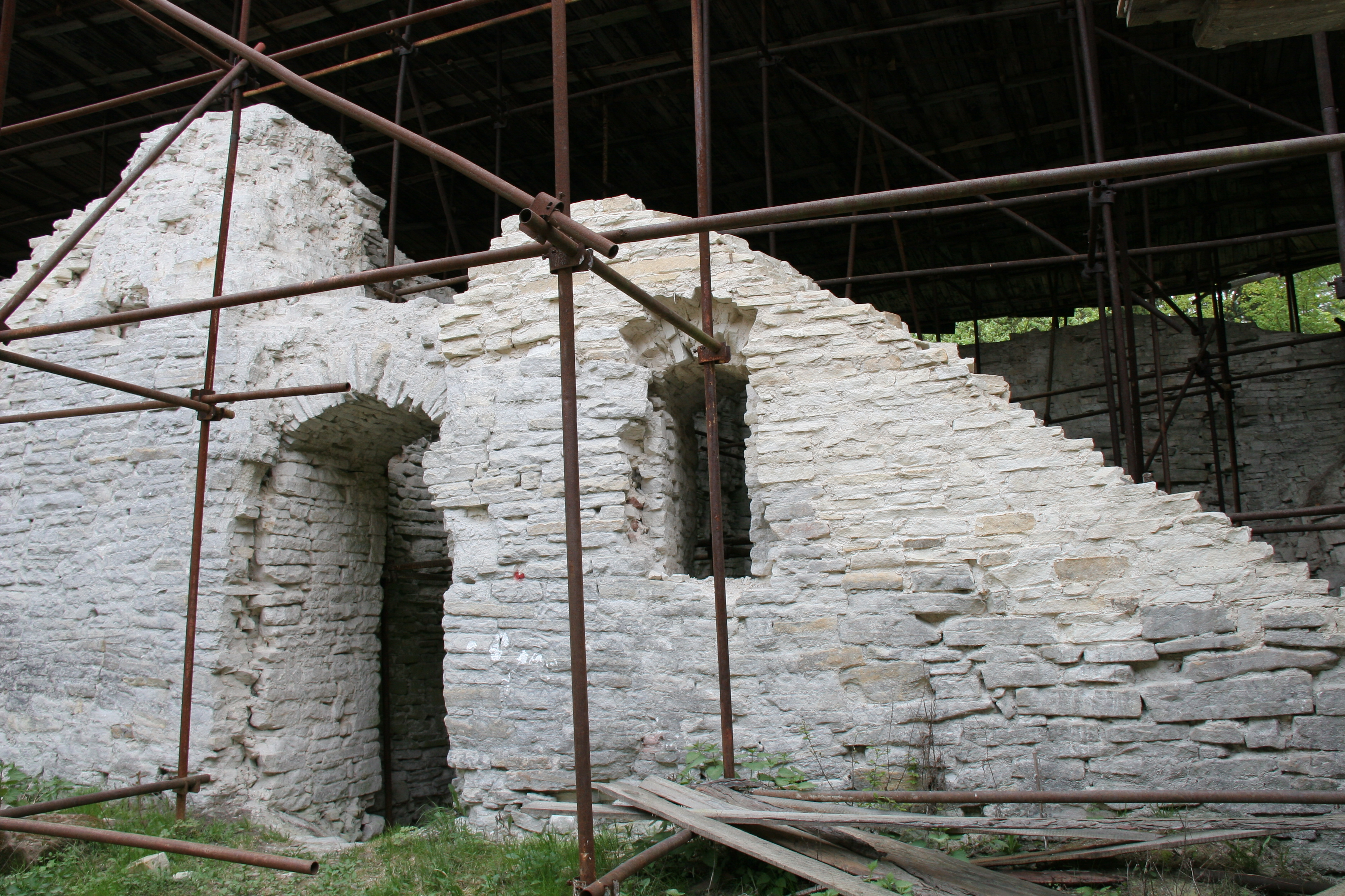 Hrad Vízmburk (Wiesenburg), zřícenina a archeologické stopy (Podhradí), na ostrohu nad údolím Úpy, Podhradí